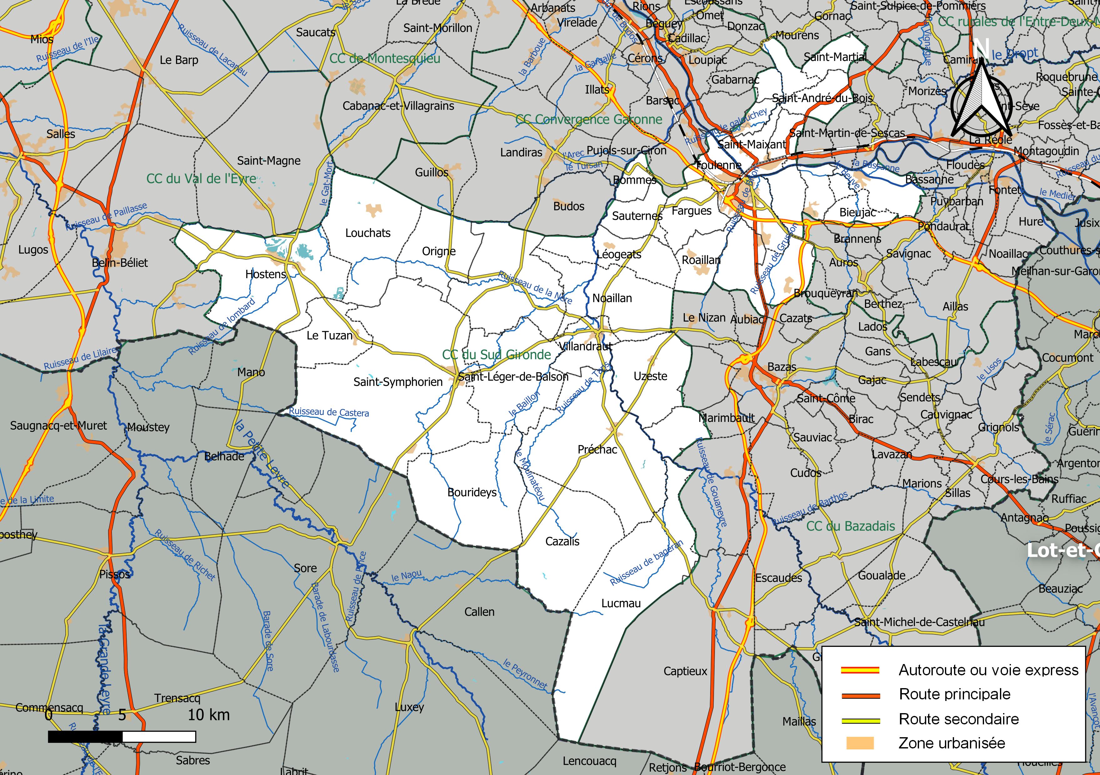 Carte géographique de la Communauté de communes du Sud Gironde, département de la Gironde, France. Composition au 1er janvier 2019.